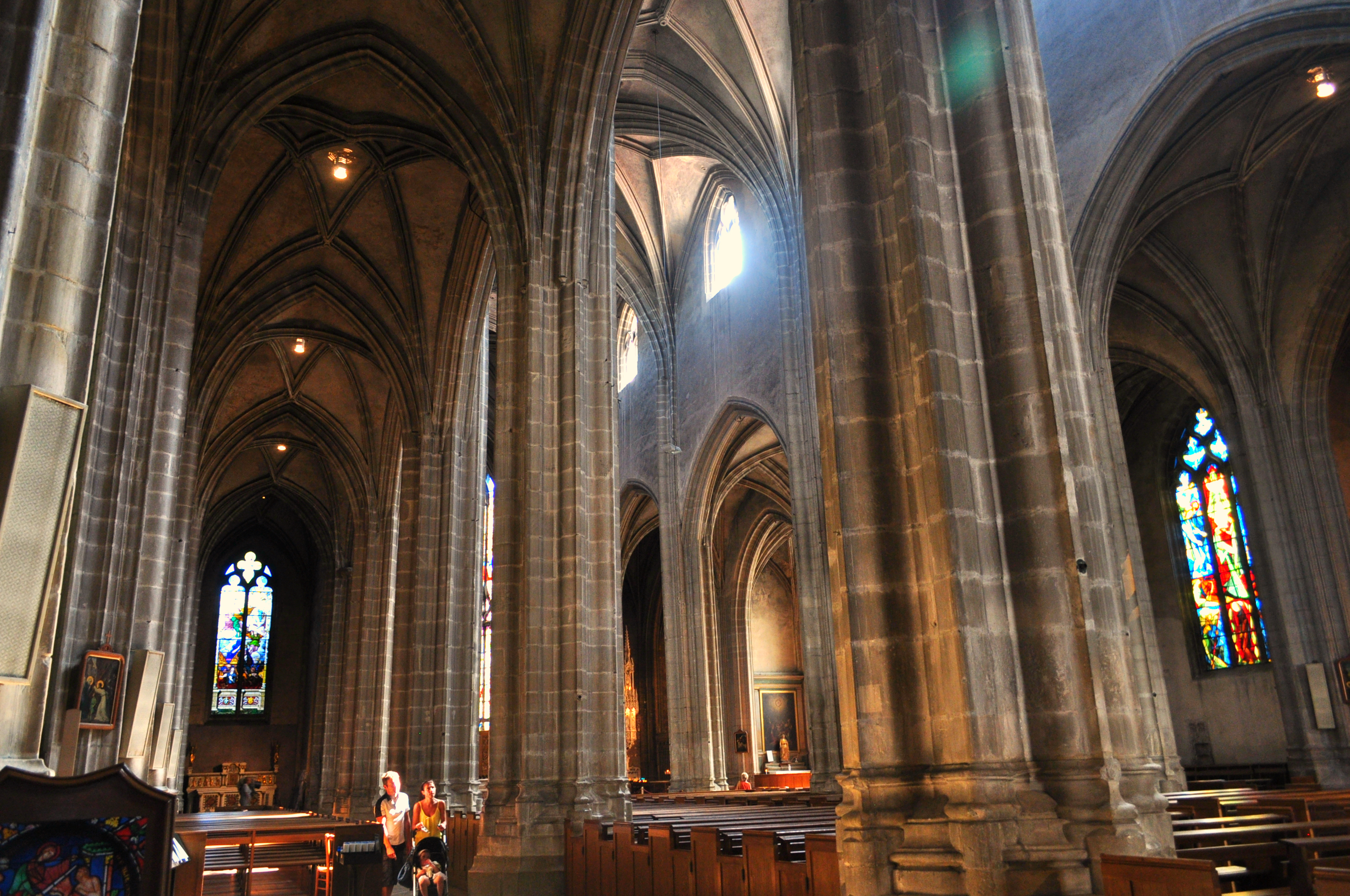 Catedral situada en la ciudad francesa de Bourg-en-Bresse, en la región del Ródano-Alpes. .